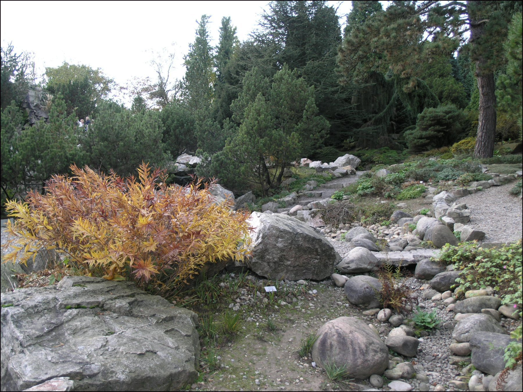 Grugapark (Essen, Germany)